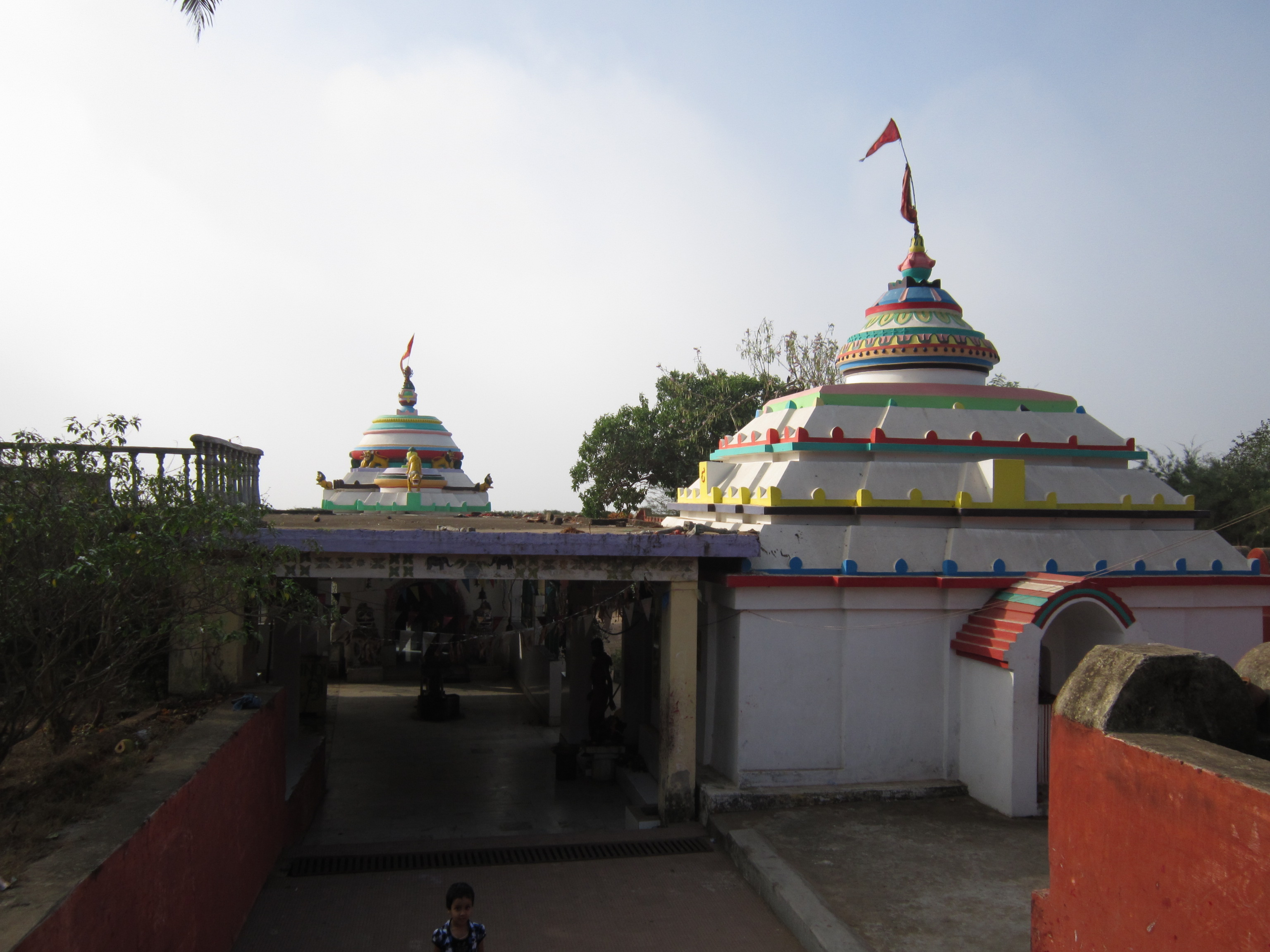 ଓଡ଼ିଆ: ରାମଚଣ୍ଡୀ ମନ୍ଦିର